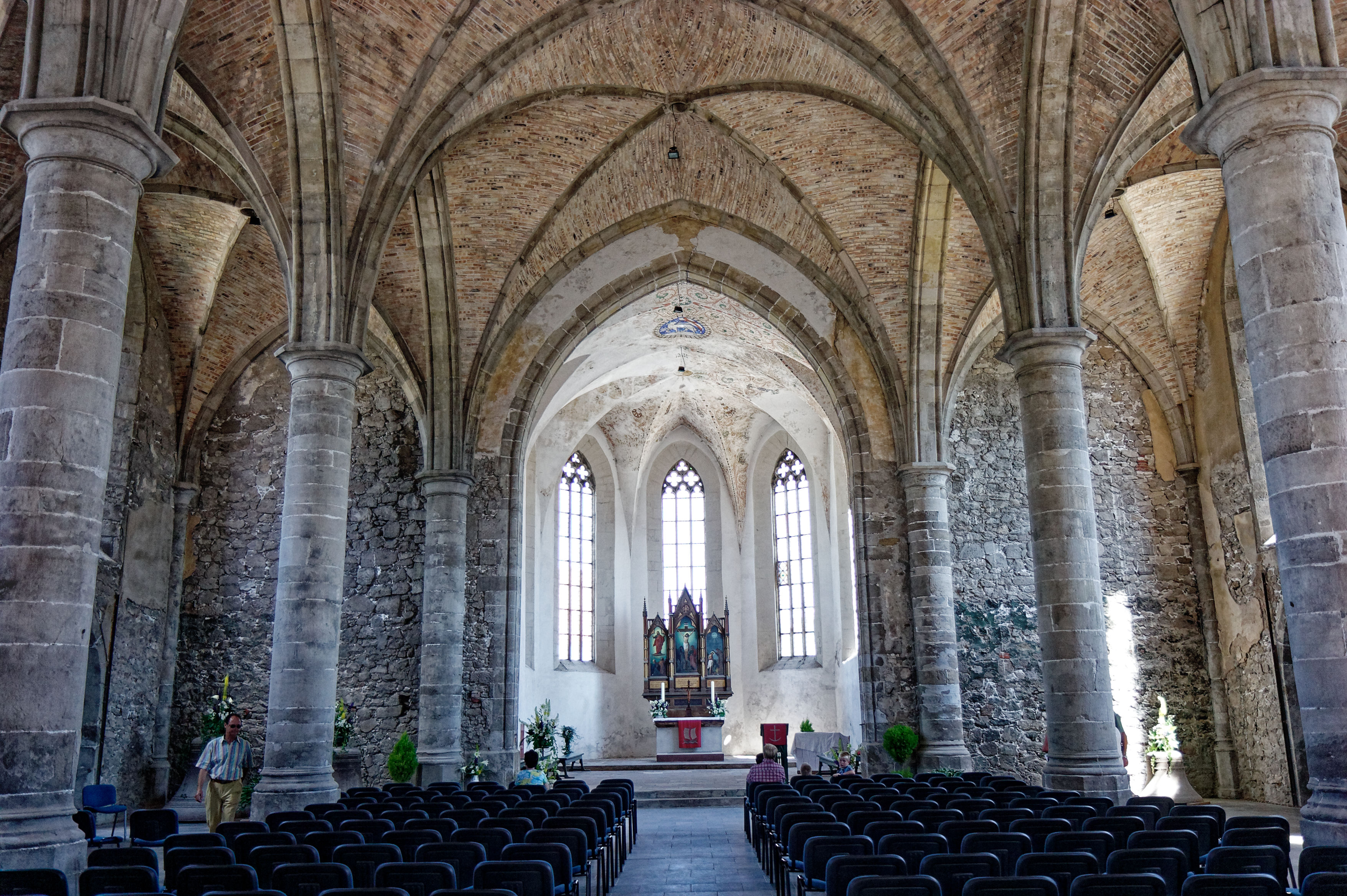 Innenaufnahme der St. Johannis Kirche in Ellrich